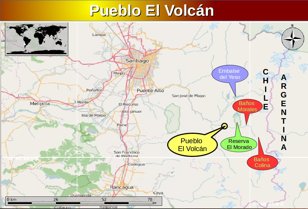 ubicación del pueblo el volcán en la región metropolitana de chile